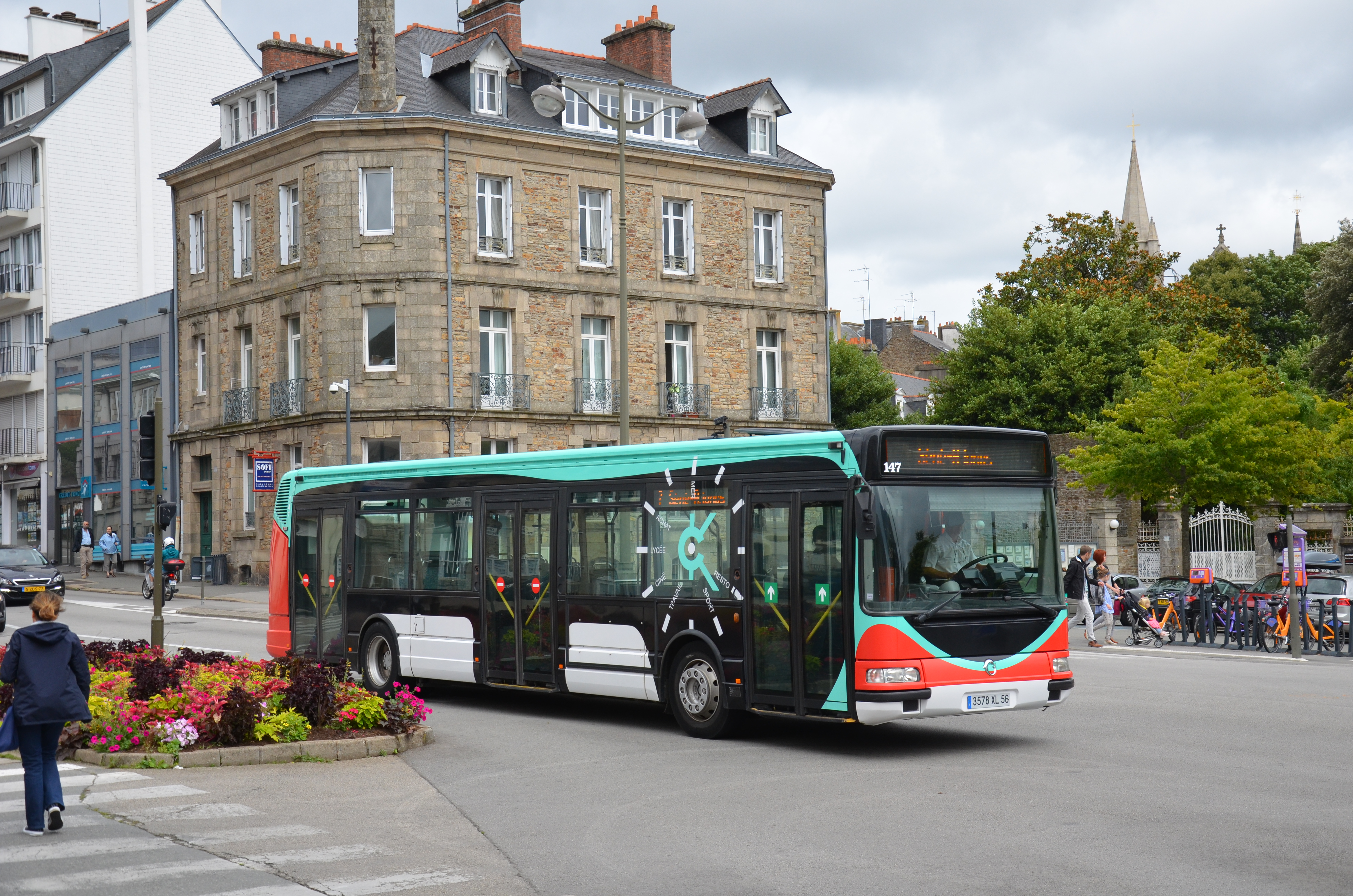 Irisbus Agora S n°147 approchant de l'arrêt République, sur le réseau Kicéo de Vannes.